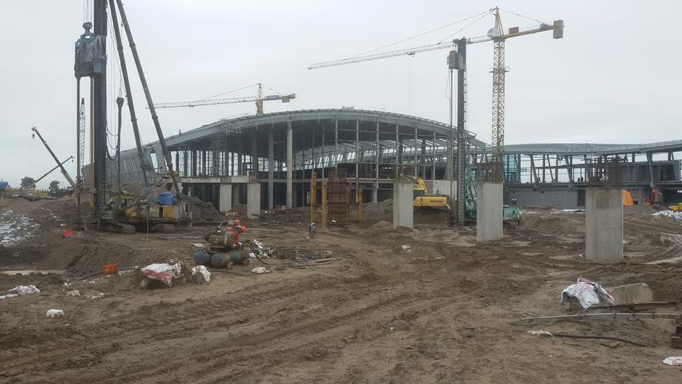 Thi công Nhà ga hành khách mới thuộc Cảng hàng không quốc tế Cát Bi với công suất thiết kế 4 triệu lượt hành khách mỗi năm.